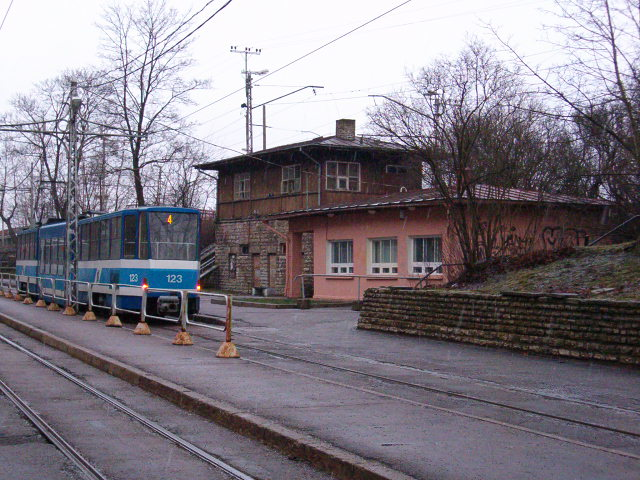 Tondi raudteejaama hoone (vasakul) ja trammide lõppjaam. Tallinn.